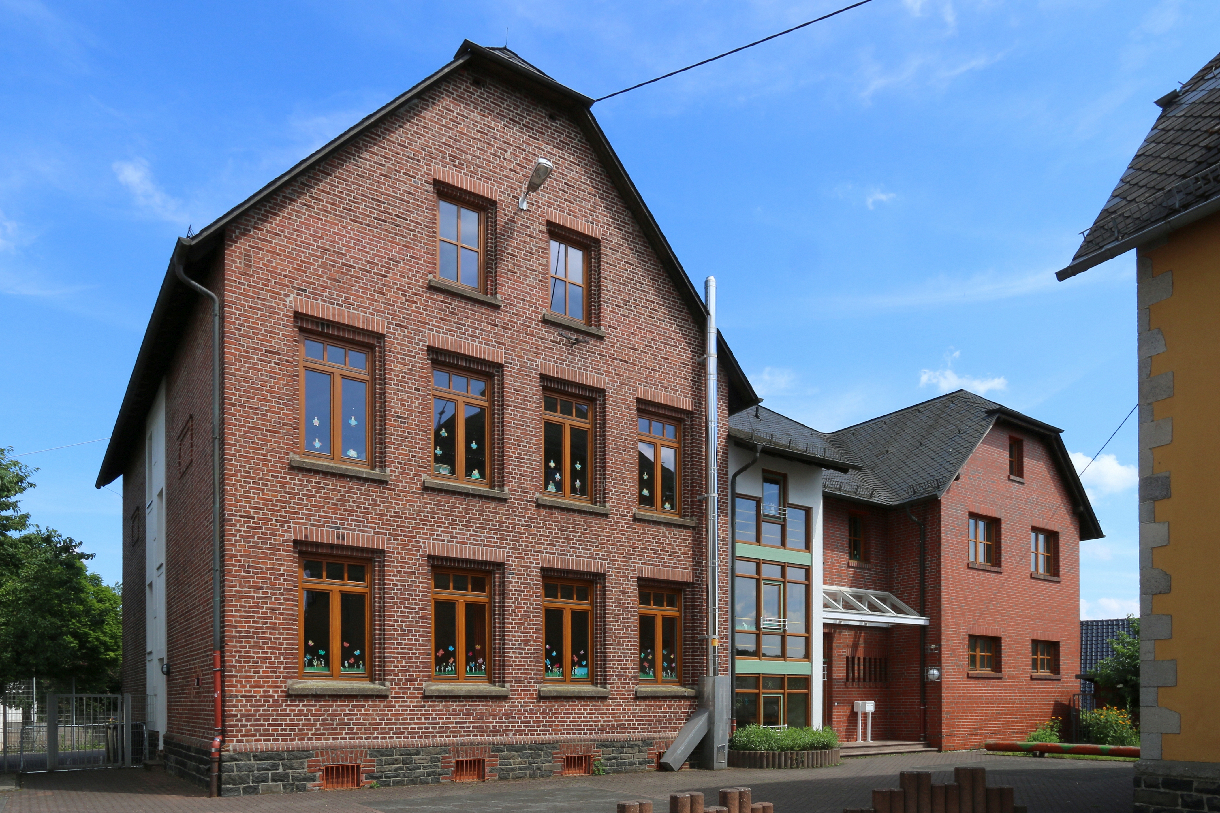 Gemünden, Westerwald: Grundschule